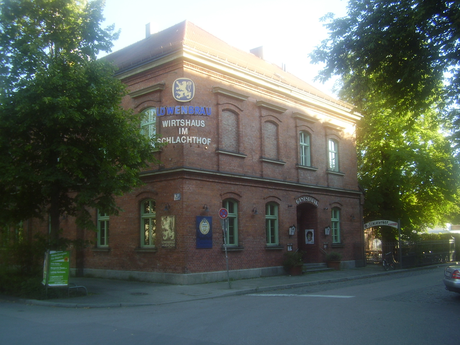 Wirthaus im Schlachthof, München